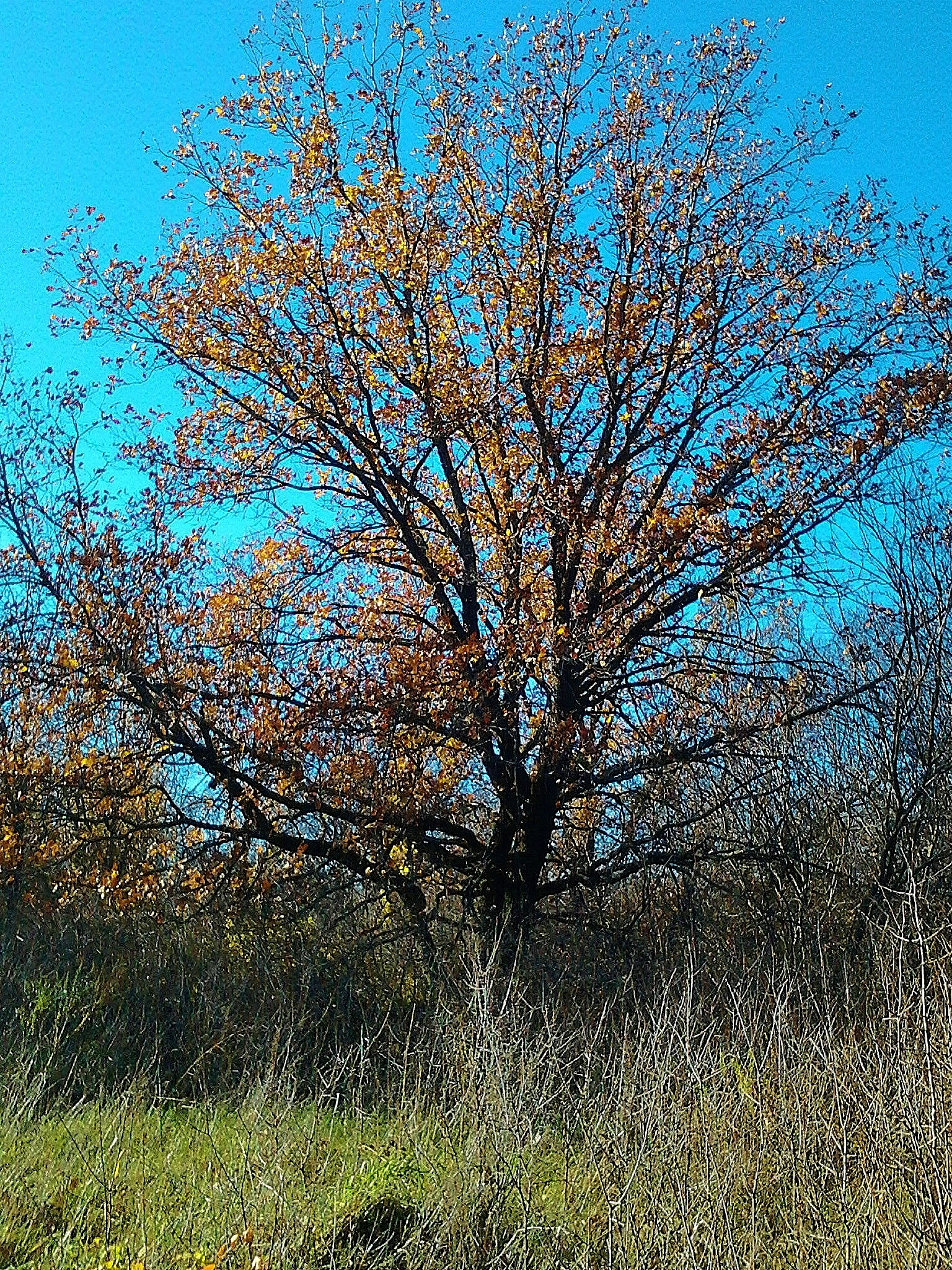 Дуб черешчатый (Нижняя Добринка)